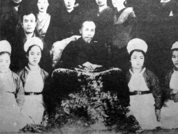 a Japanese man 大隈重信 (Shigenobu Okuma)